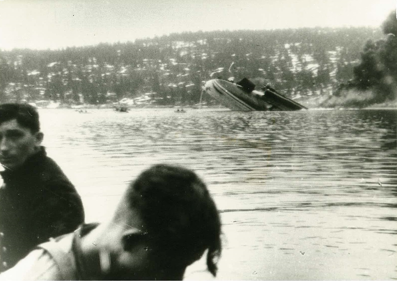 German soldiers who have saved themselves ashore after the sinking of Blücher in Drøbaksundet south of Oslo. Norway the 9th April 1940.